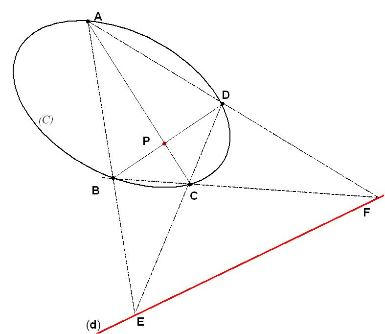 construction du pôle d'une droite par rapport à une ellipse